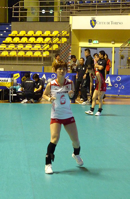 Yuko Sano, pallavolista giapponese, gioca nel ruolo di libero